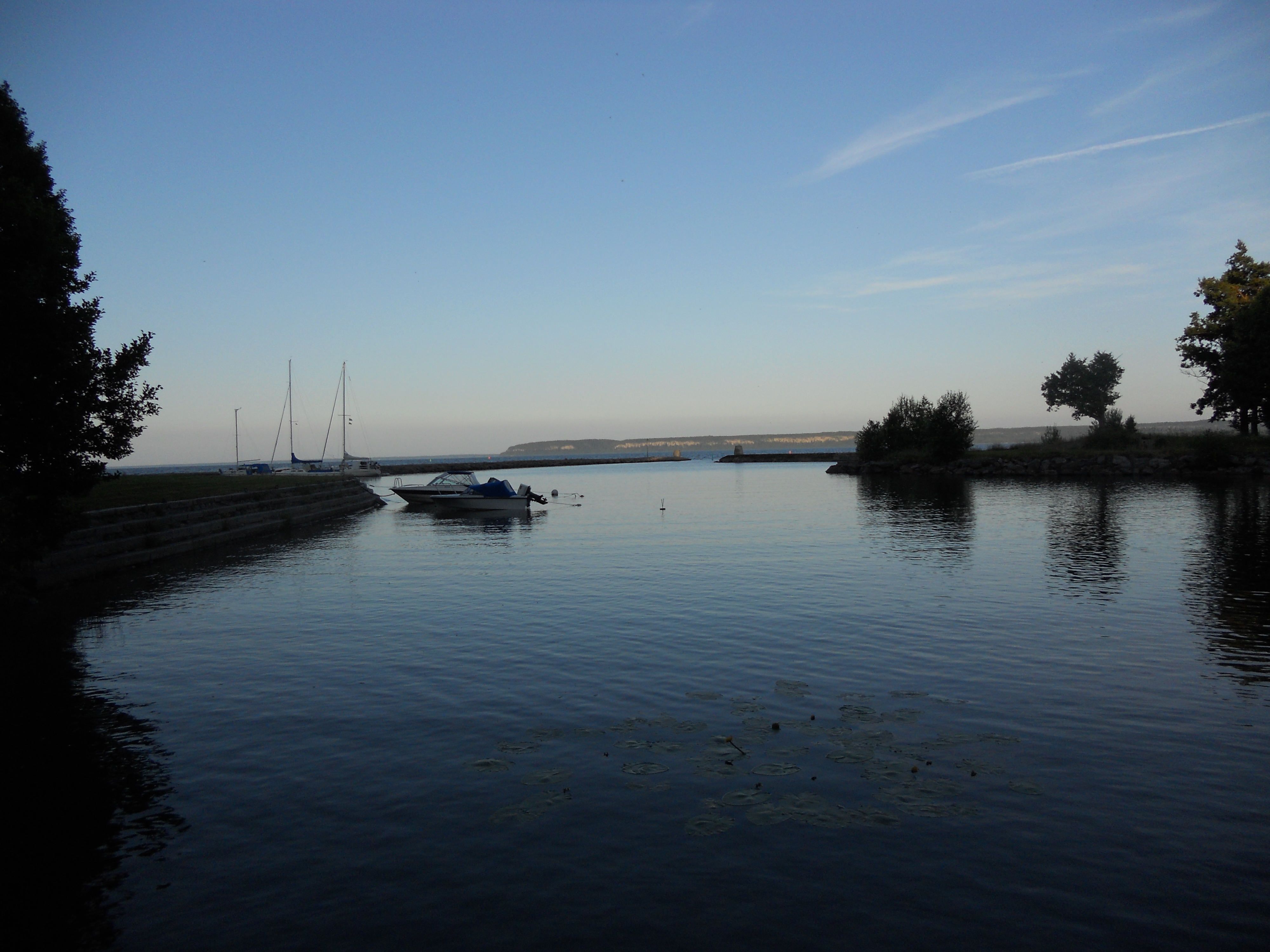 Grönviks gästhamn i skymningen. Ursand, Vänersborgs kommun.